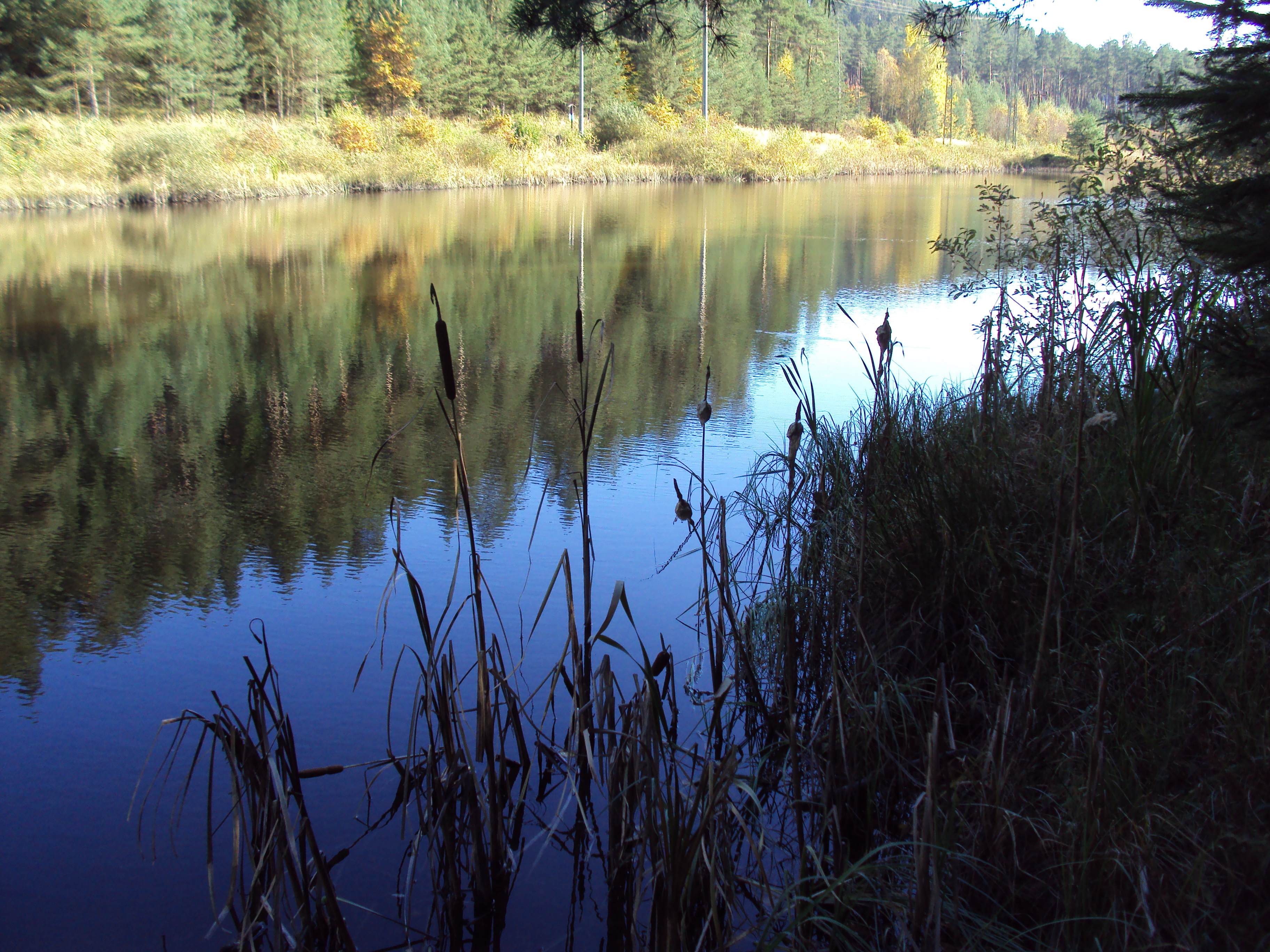 Černý rybník, PP Rašeliniště Černého rybníka, asi 1,5 km jižně od Hamr na Jezeře